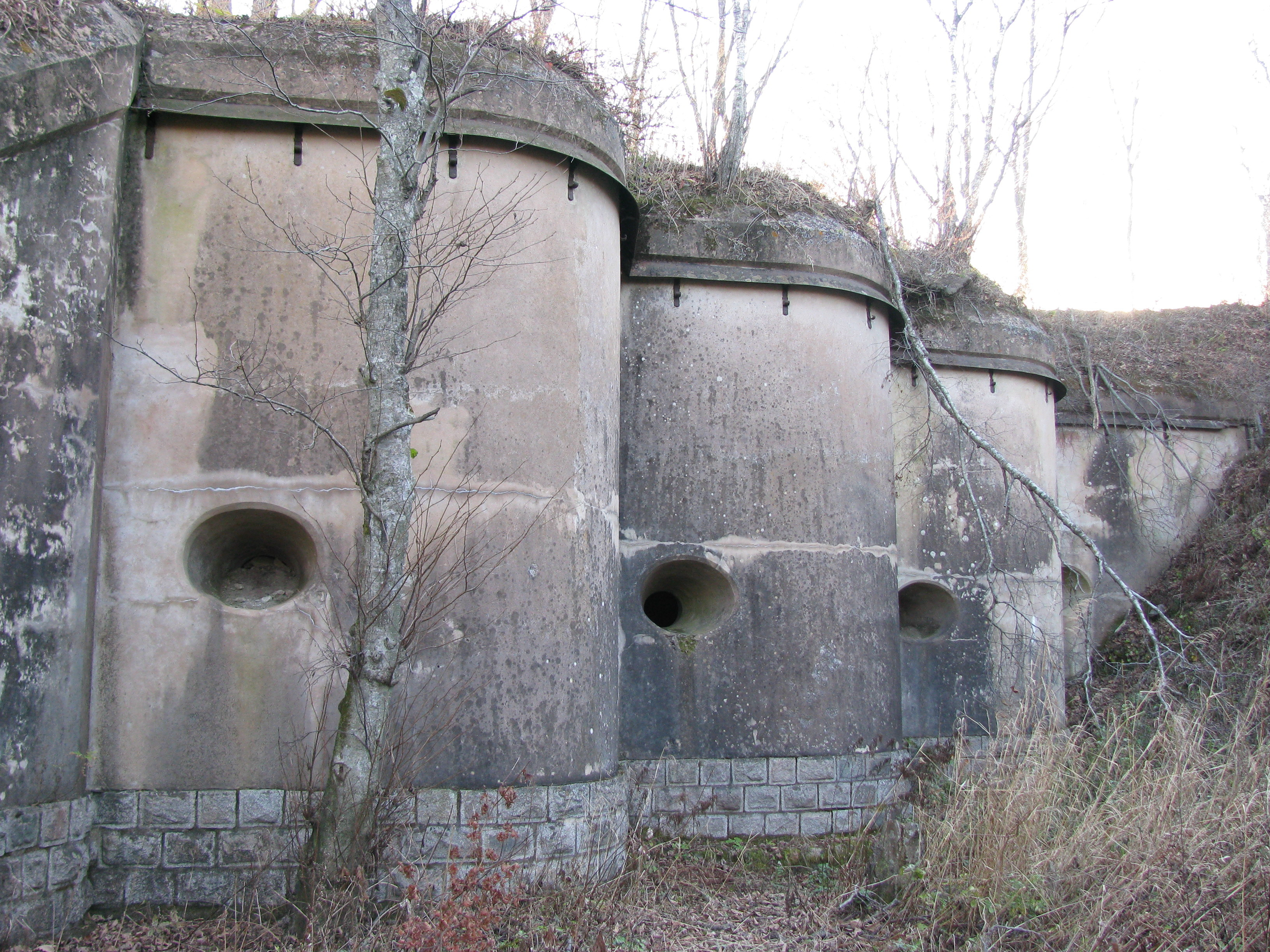 Форт №12 Владивостокской Крепости (о. Русский), кофр.